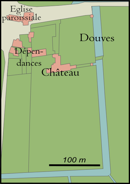 L'ancien château de Challain-la-Potherie, Maine-et-Loire, France. D'après le plan cadastral de 1832 (commune de La Potherie, feuille E2 dite de Vilate).